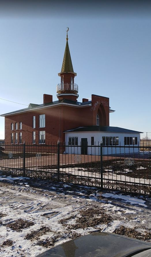 Мечеть суфийского шейха Абдурафика